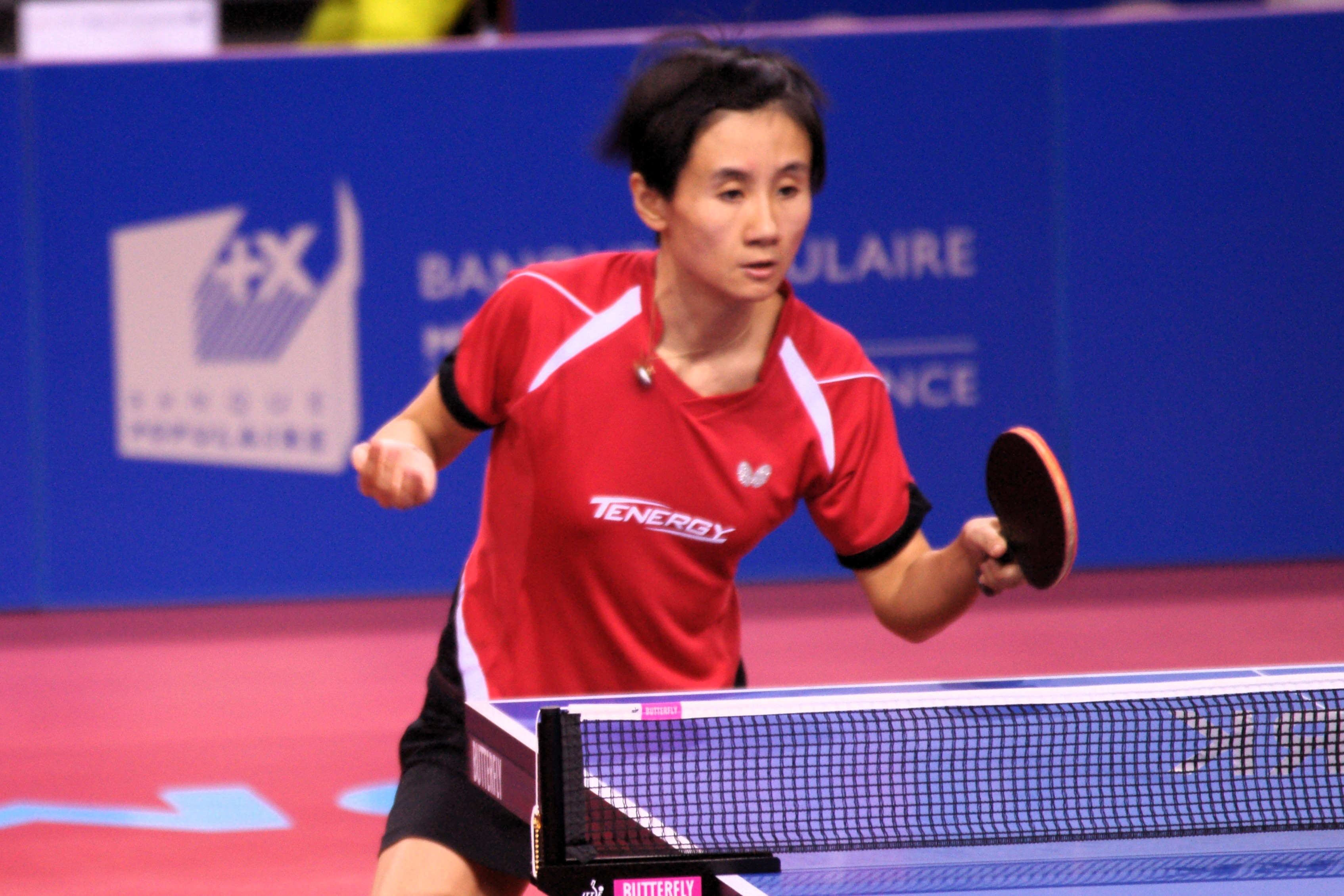 Liu Jia, Top 16 Antibes 2017